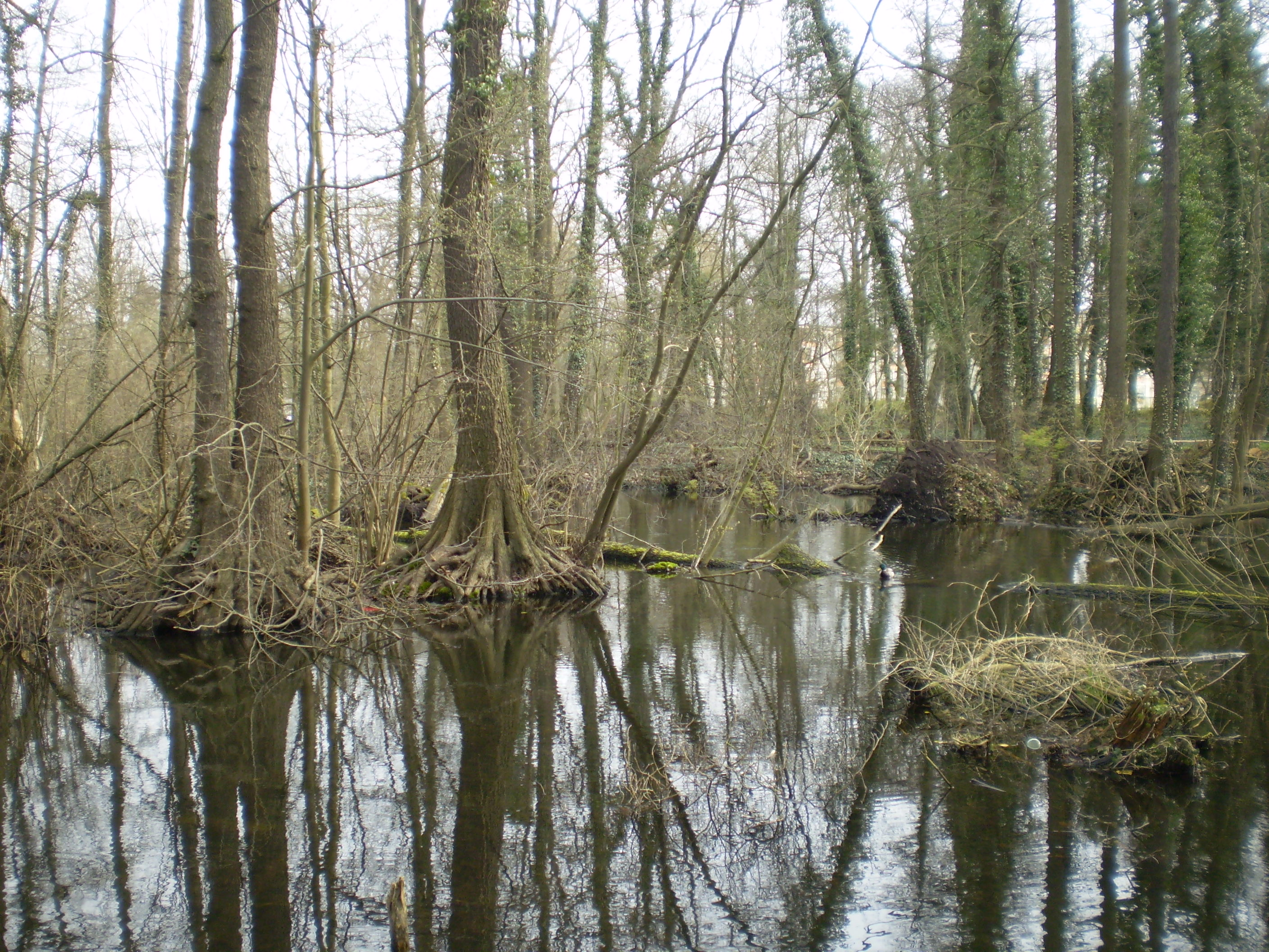 Kanallandschaft im Frühjahr 2008 im Kleinen Spreewald Park in Schöneiche bei Berlin